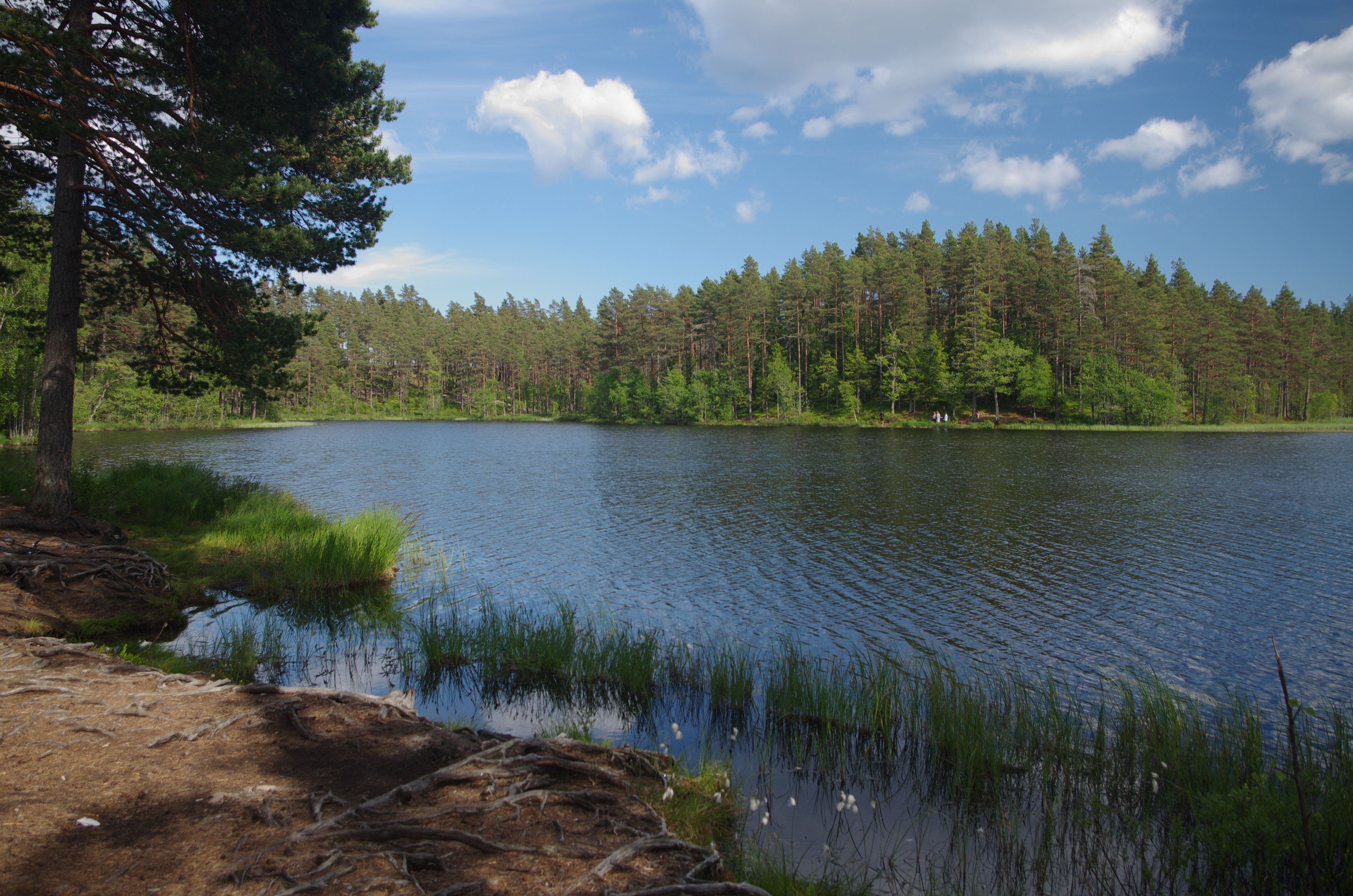 Kroksjön på Hökensås i Tidaholms kommun i Västergötland, Sverige. Sjön är en fiskesjö med häckande storlom i sjöns närhet.